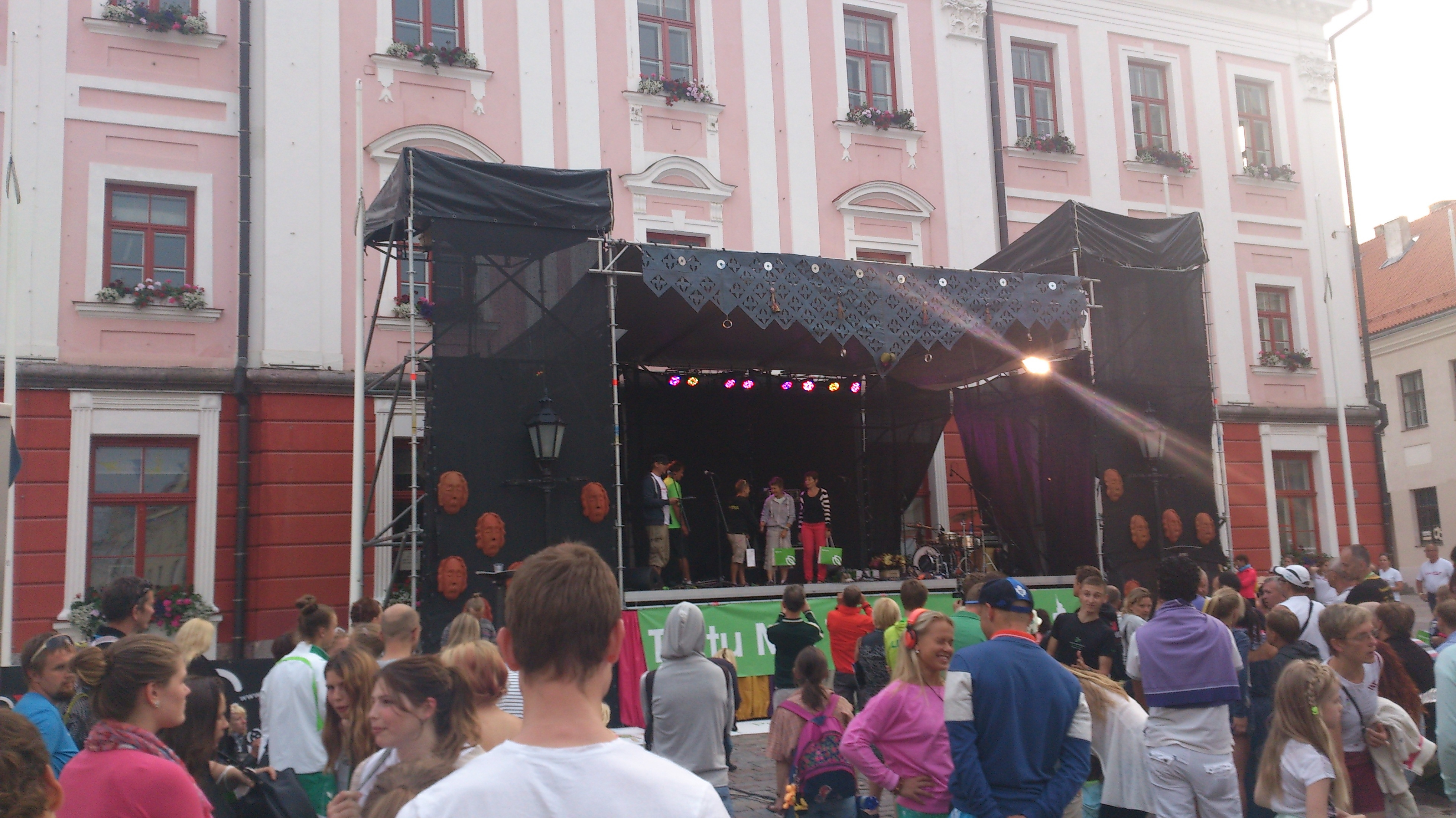 Tartu Mill Triathloni autasustamine raeplatsil Tartu hansapäevadel 2014